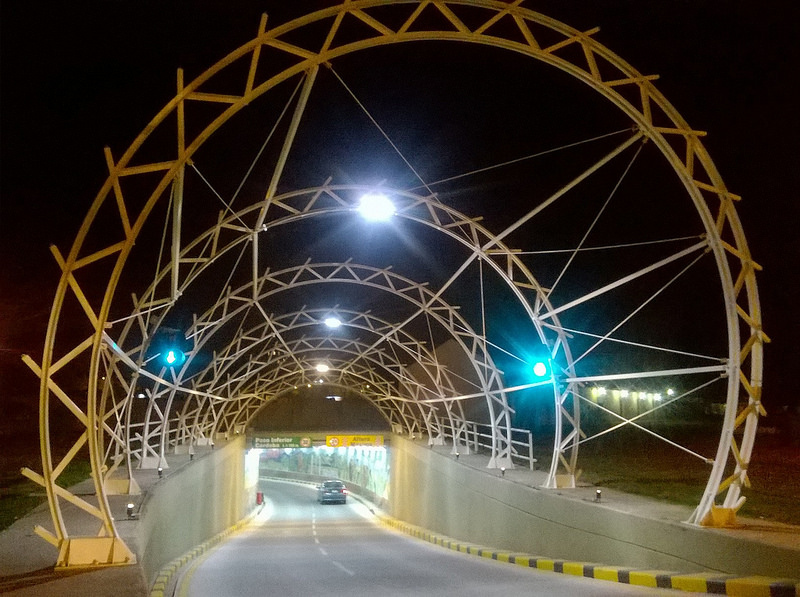 tunel tuc